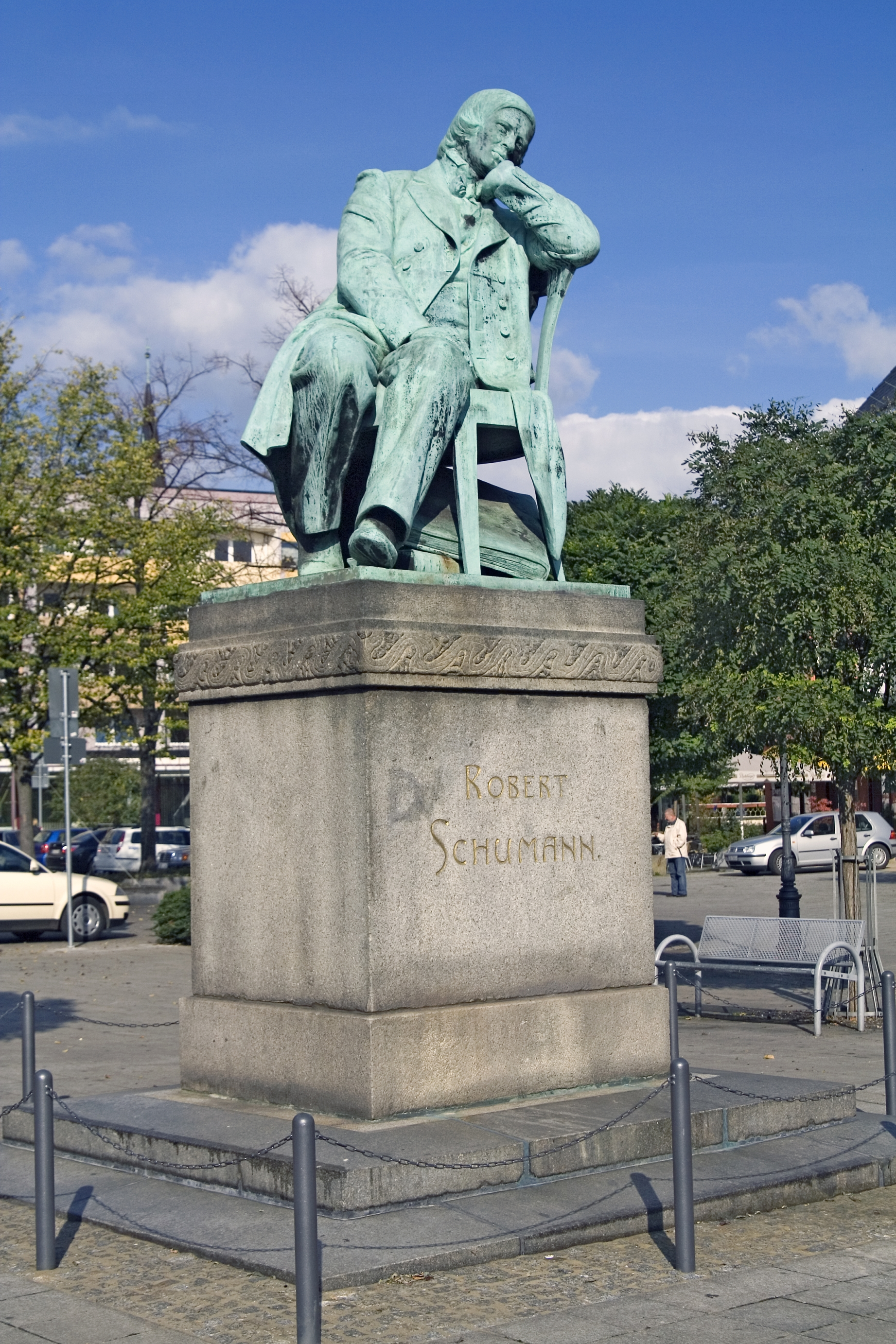 Robert Schumann, monument in Zwickau